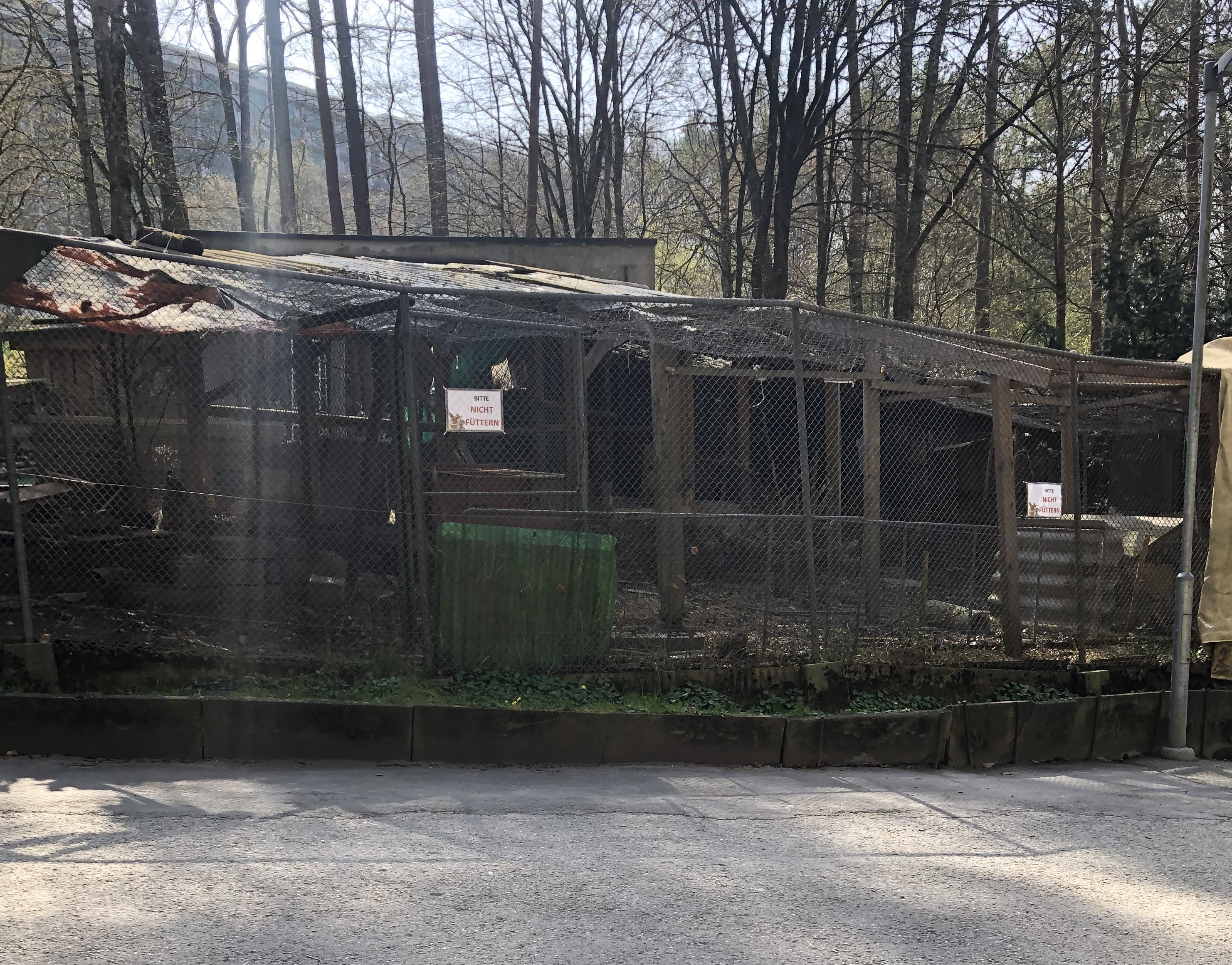 Gäbelbach ehemaiger Tierpark Stallungen